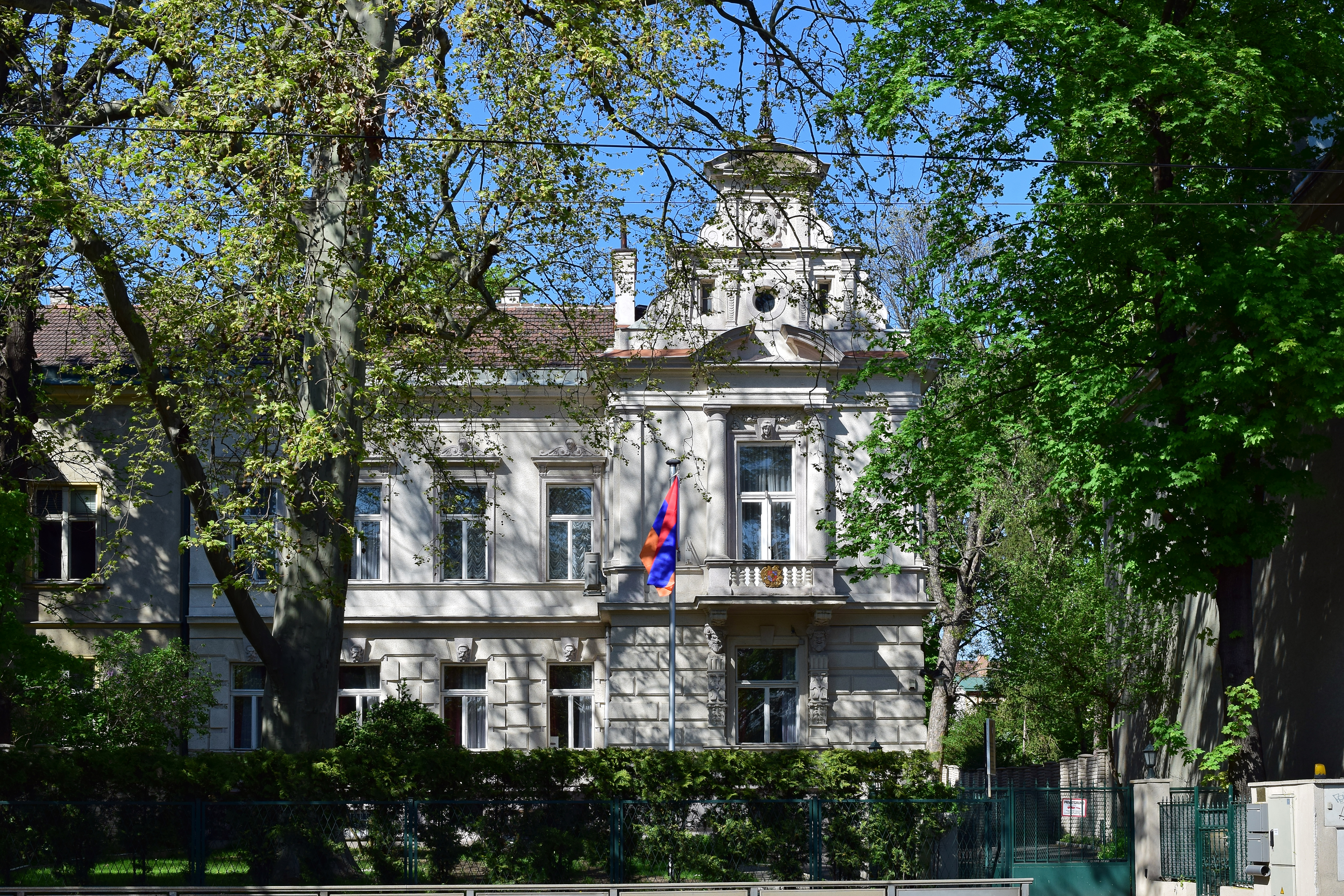 Armenische Botschaft in 1140 Wien, Hadikgasse 28